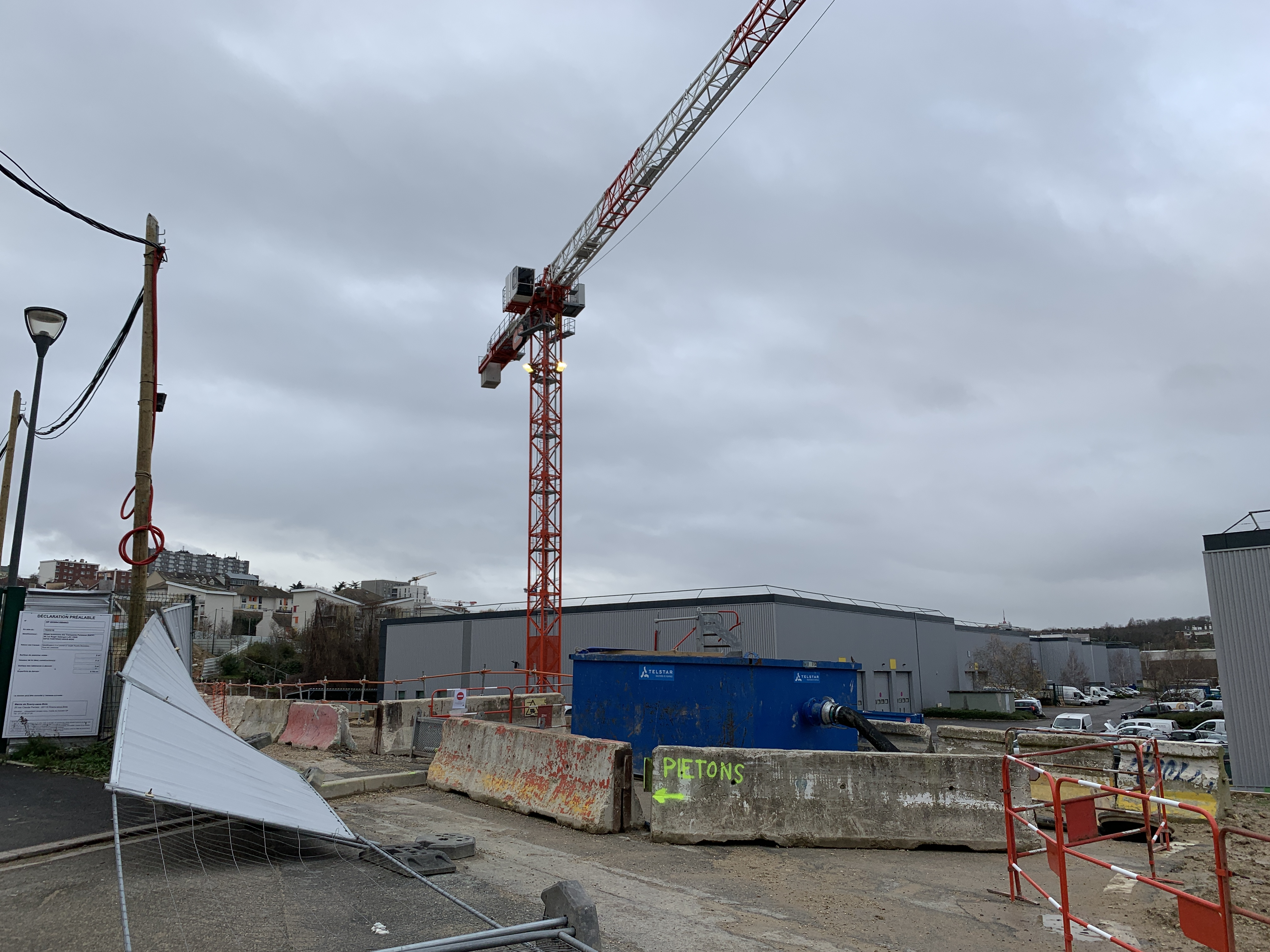 Chantier de construction de la station de métro Coteaux Beauclair et du viaduc sur lequel sera posé la station, Rosny-sous-Bois.